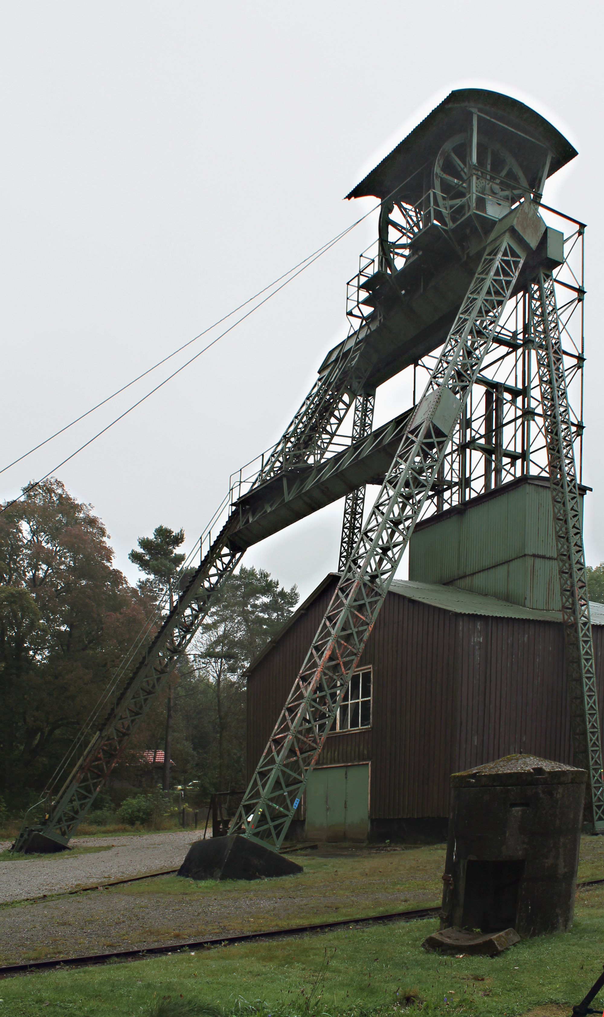 Das Fördergerüst des Ottiliae-Schachtes, ein englischer Bock, in Clausthal-Zellerfeld. Niedersachsen, Deutschland.